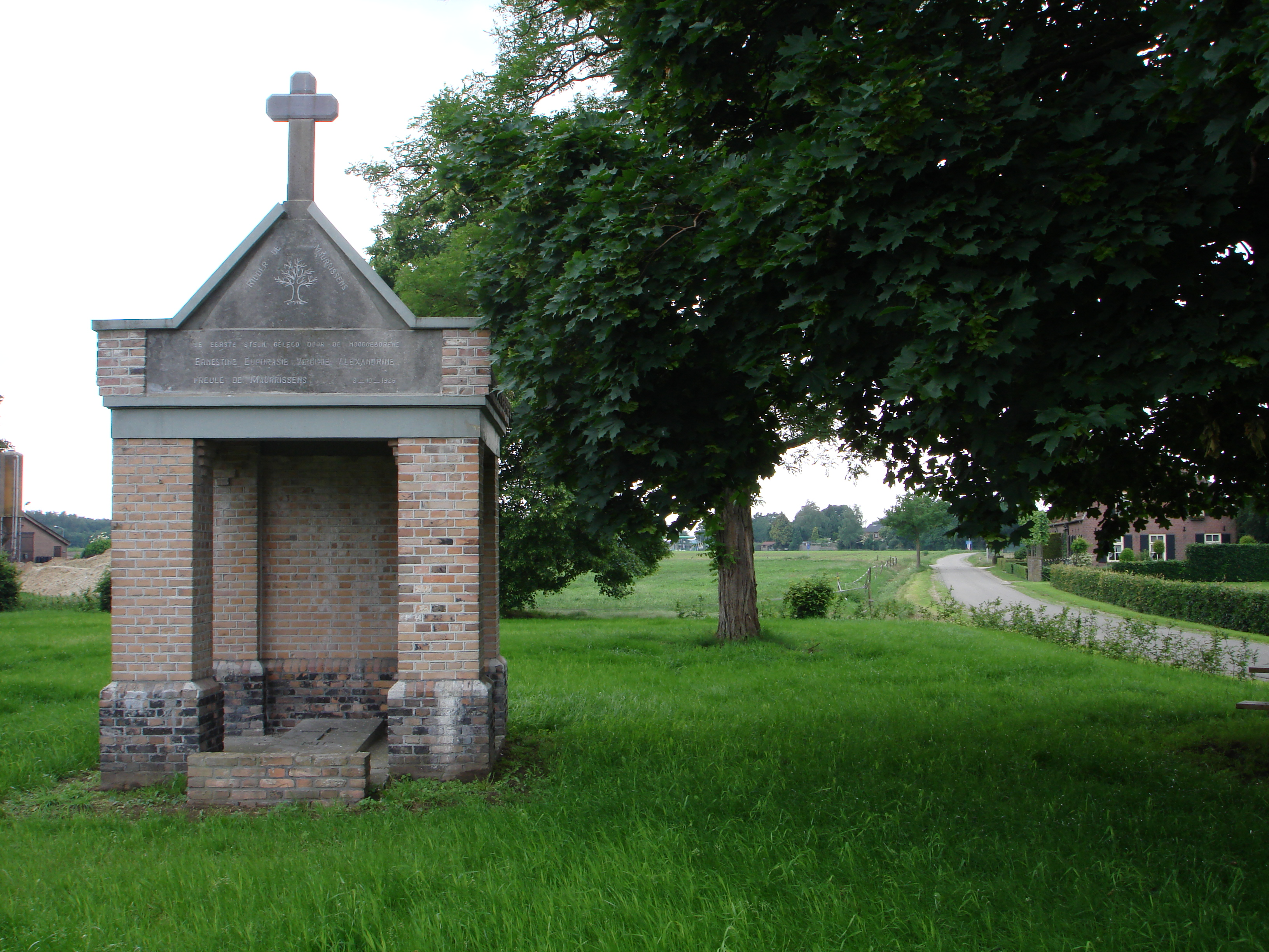 Foto zelf gemaakt op 27 mei 2007. Keunen